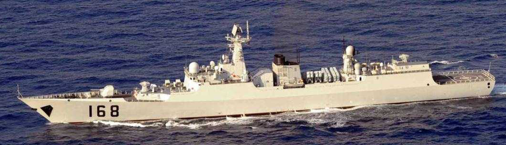 ５月６日（日）午前６時頃、海上自衛隊第５航空群（那覇）所属「Ｐ－３Ｃ」が、沖縄本島の南西約６５０ｋｍの海域を太平洋に向けて南東進する中国海軍のルーヤンI級ミサイル駆逐艦２隻、ジャンカイII級フリゲート２隻及びユージャオ級揚陸艦１隻の合計５隻を確認した。 このうち、ルーヤンI級ミサイル駆逐艦及びユージャオ級揚陸艦は、海上自衛隊において初めて確認したものである。また、沖縄本島南西約６１０ｋｍの海域において艦載ヘリコプターの飛行及び陣形運動を行っていたことが確認されている。